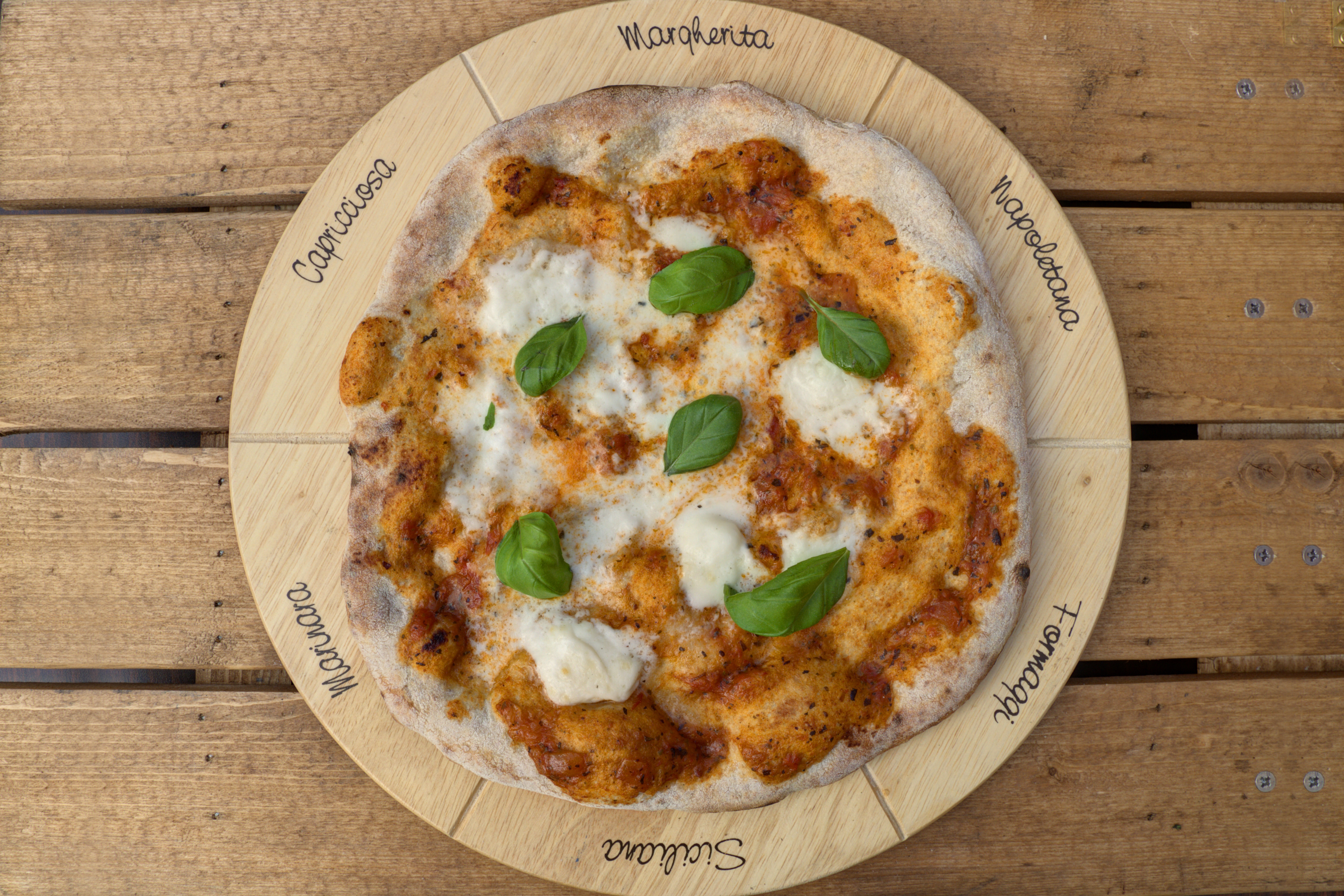 European Classical Pizza Margherita in pizza restaurant